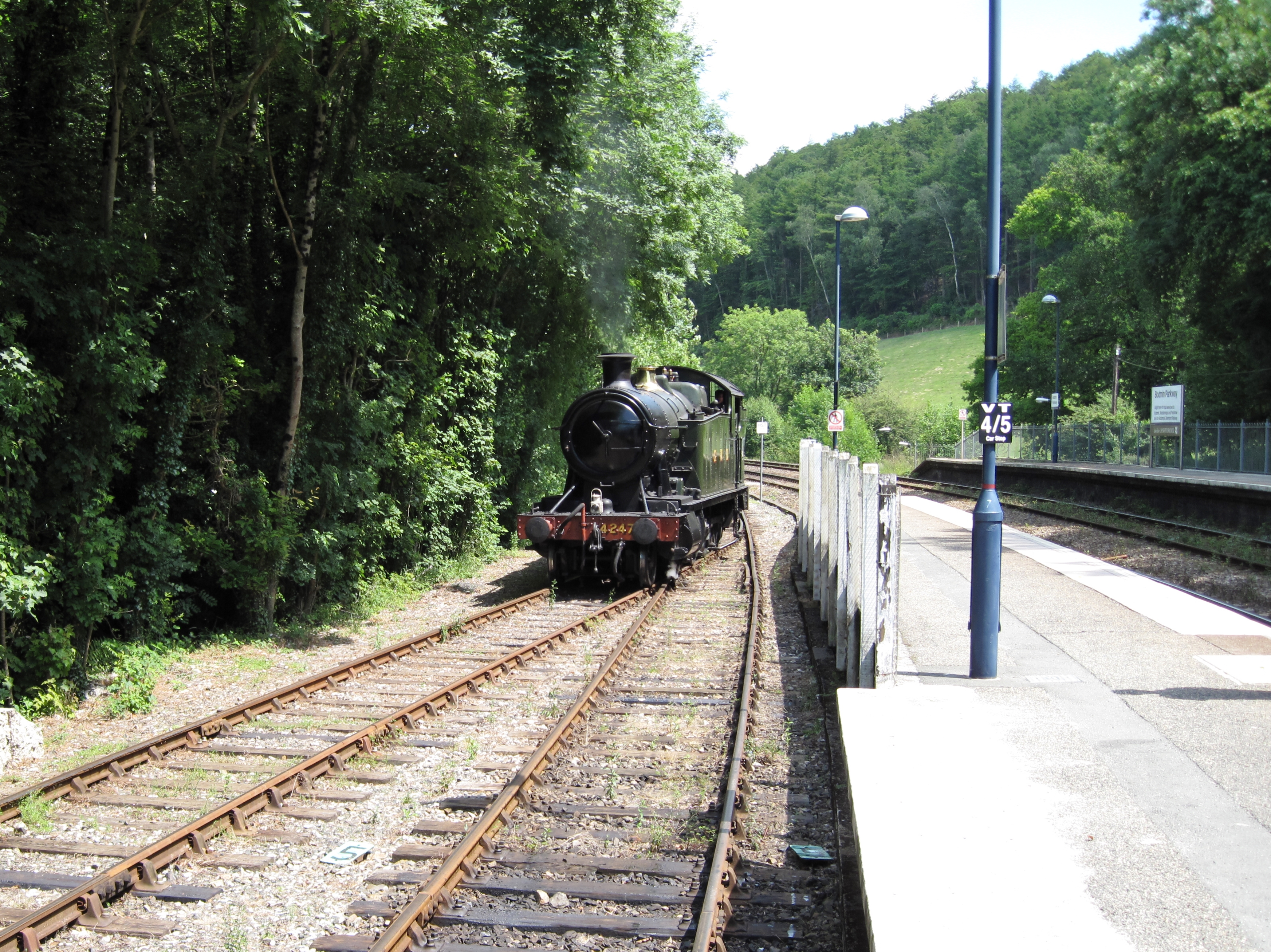 Lokwechsel der Museumsbahn im Bahnhof Bodmin Parkway, Cornwall, Großbritannien